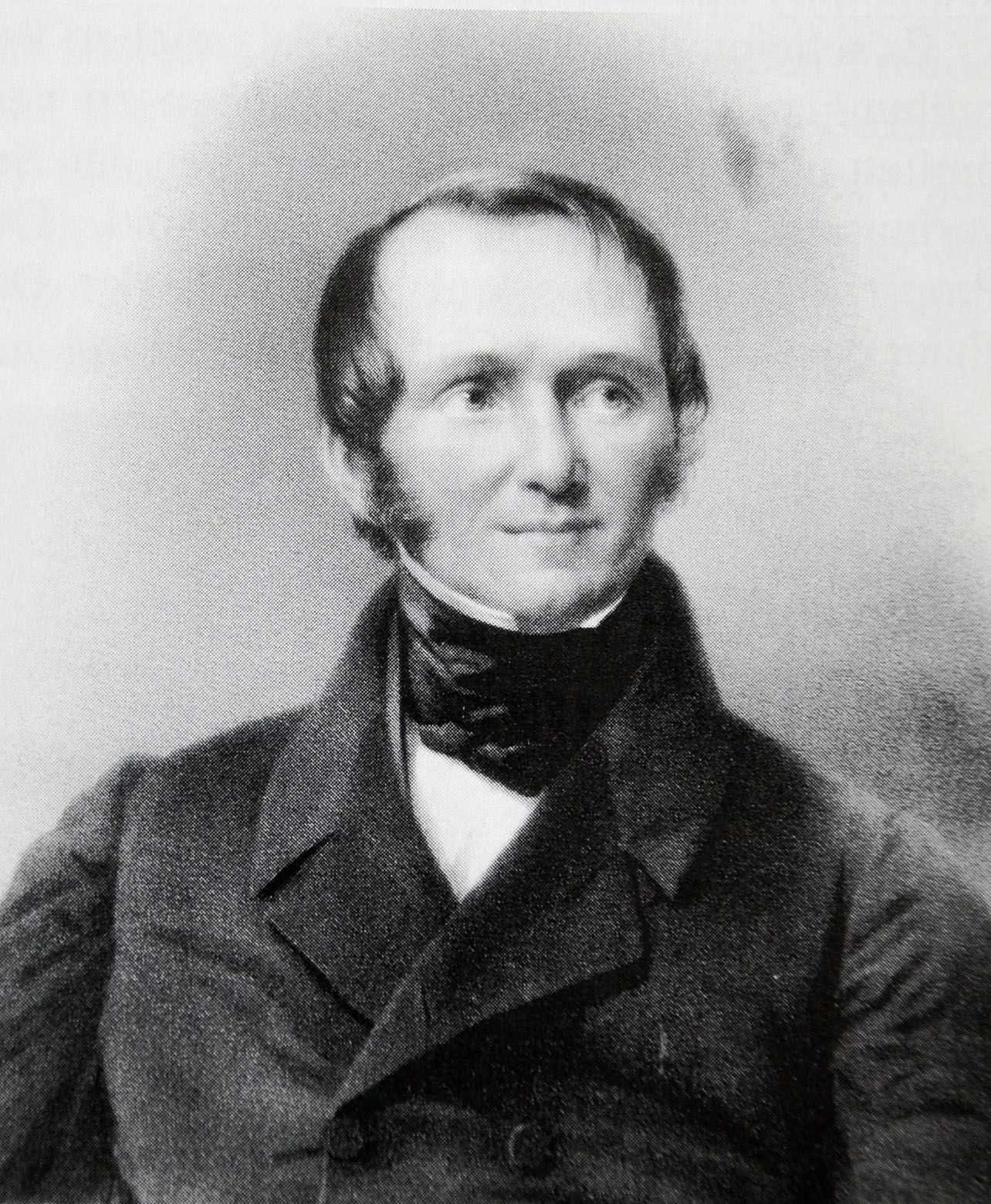 Foto des Ernst von Bodelschwingh